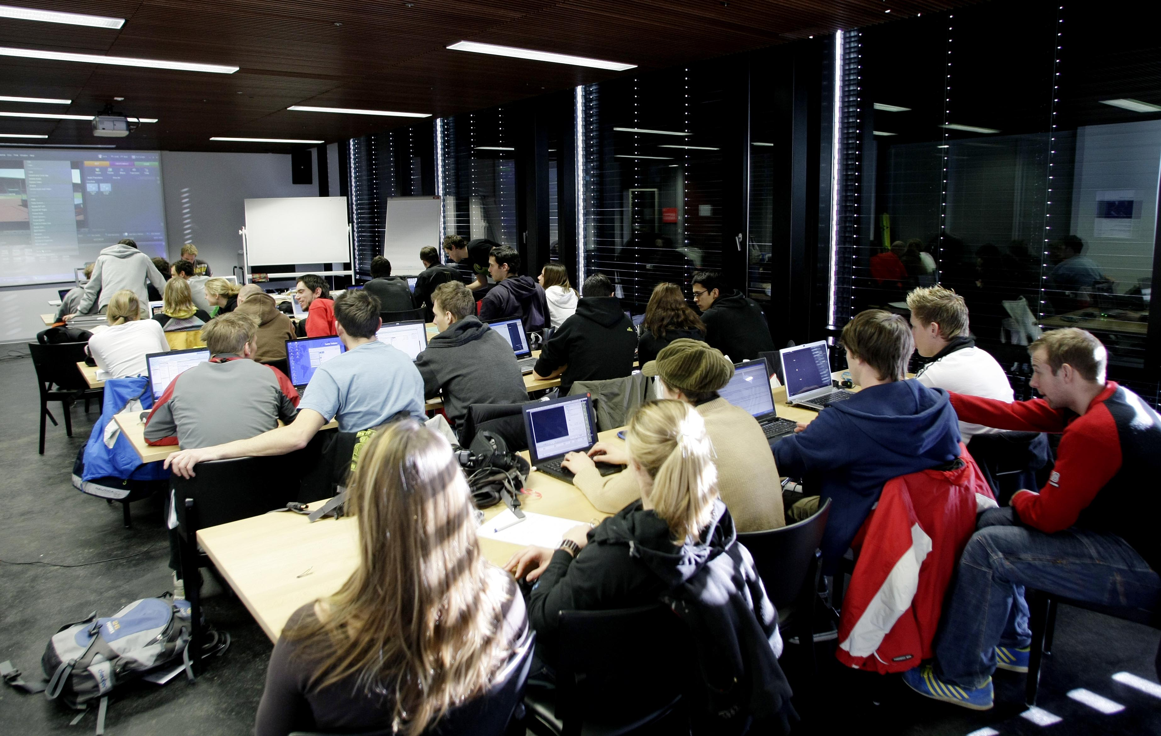 Schulklasse im Unterricht